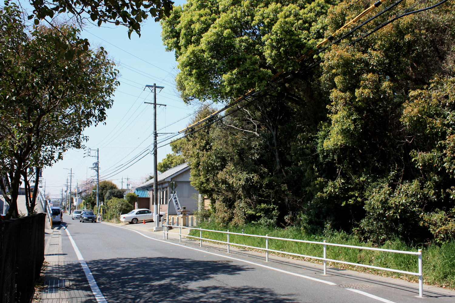 追分新田道（名古屋市緑区桶狭間神明、2009年）